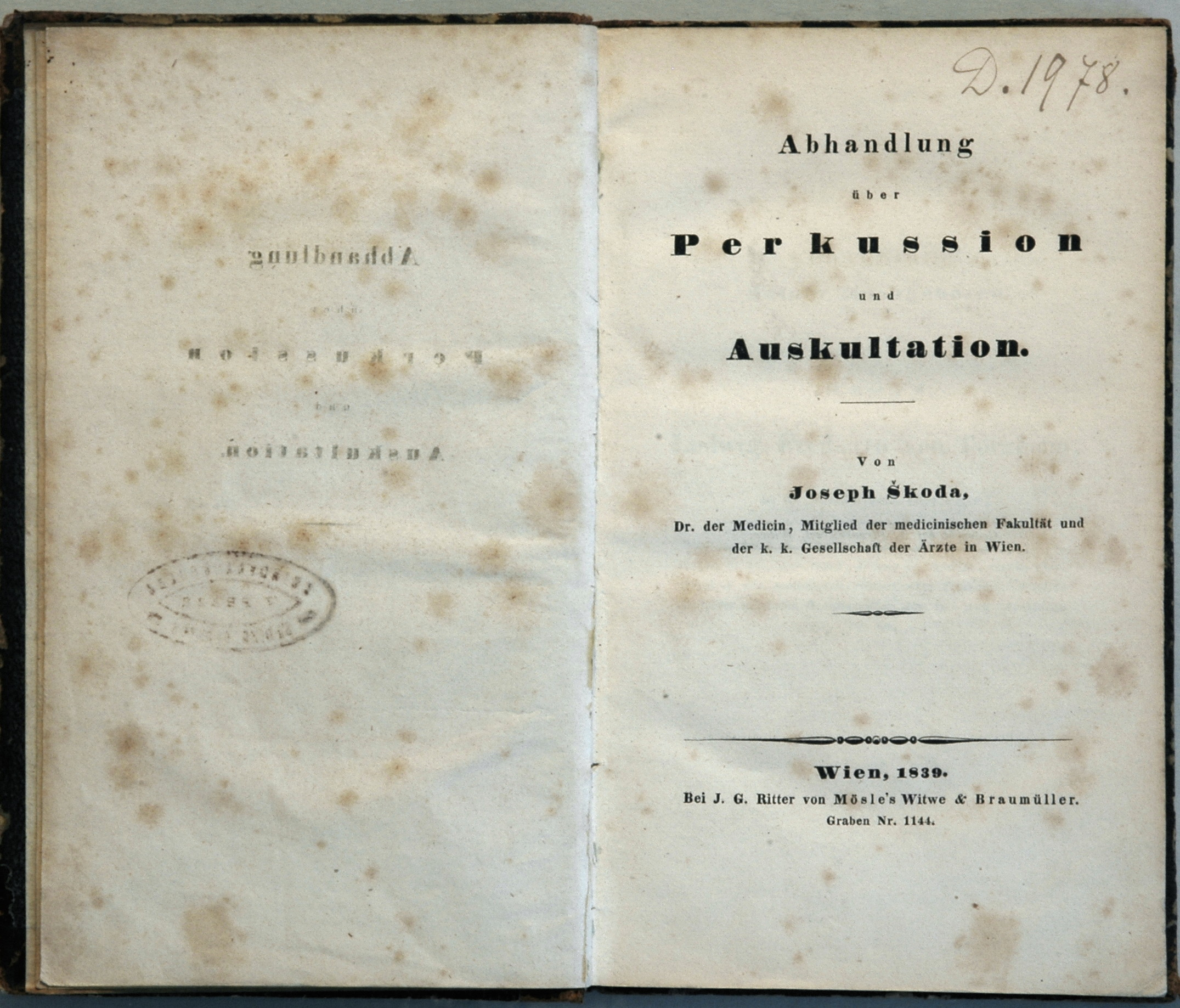 Erstdruck